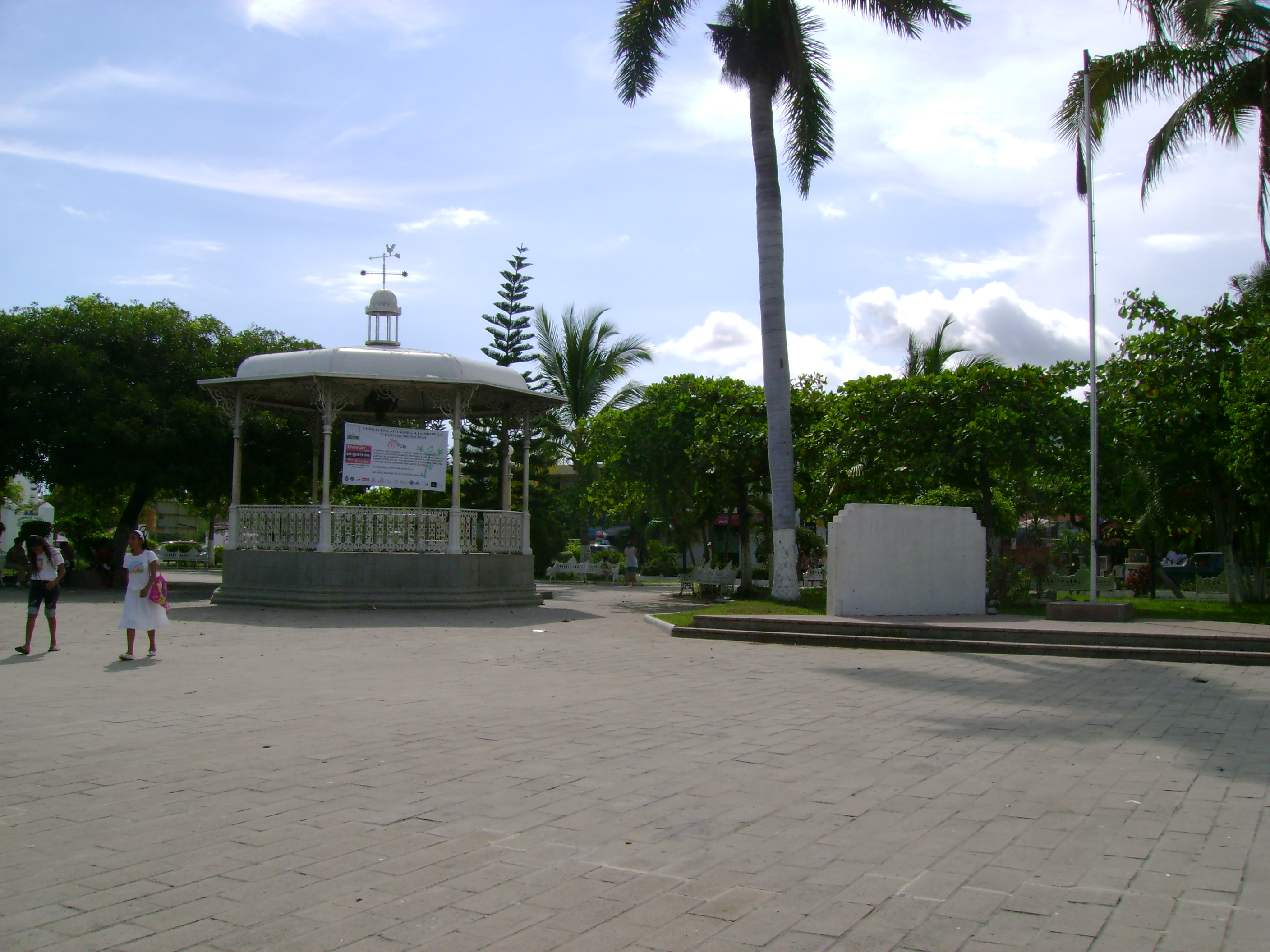 El centro de Santiago, Manzanillo, Colima.